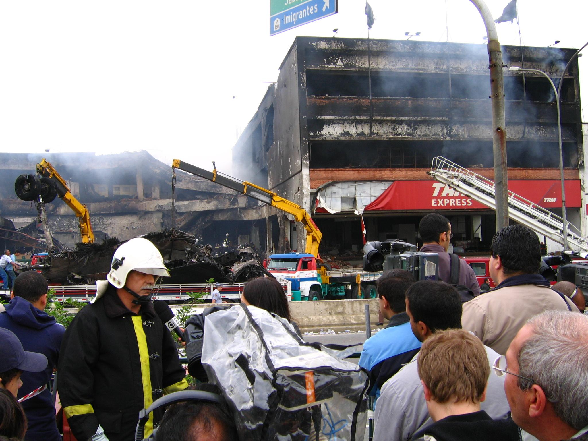 Entrevista com o coronel Manoel Antonio da Silva Araújo. Na imagem o exato ponto de impacto da aeronave da TAM conta o prédio da TAM Express.